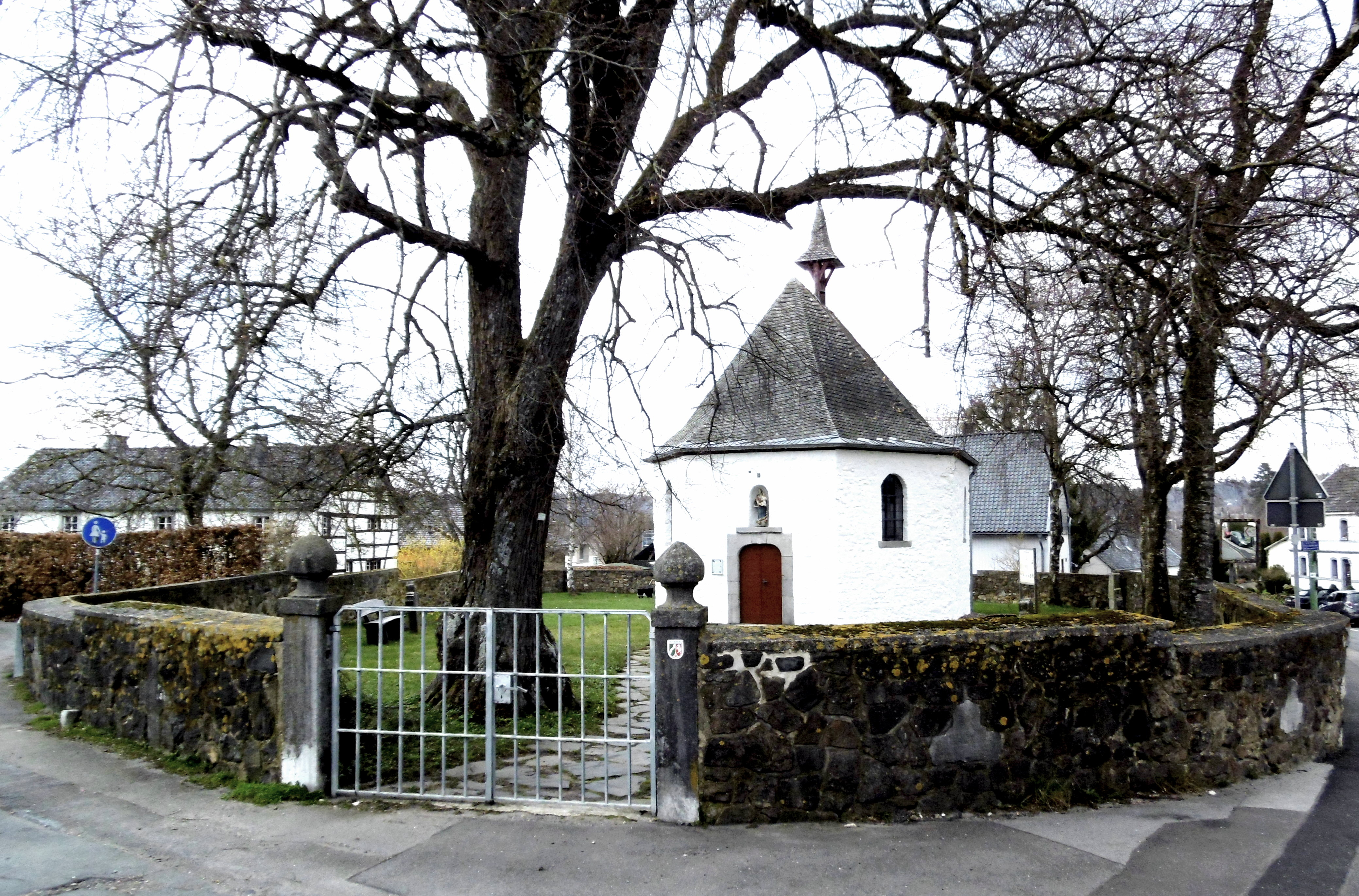 Marienkapelle Roetgen, Gesamaufnahme